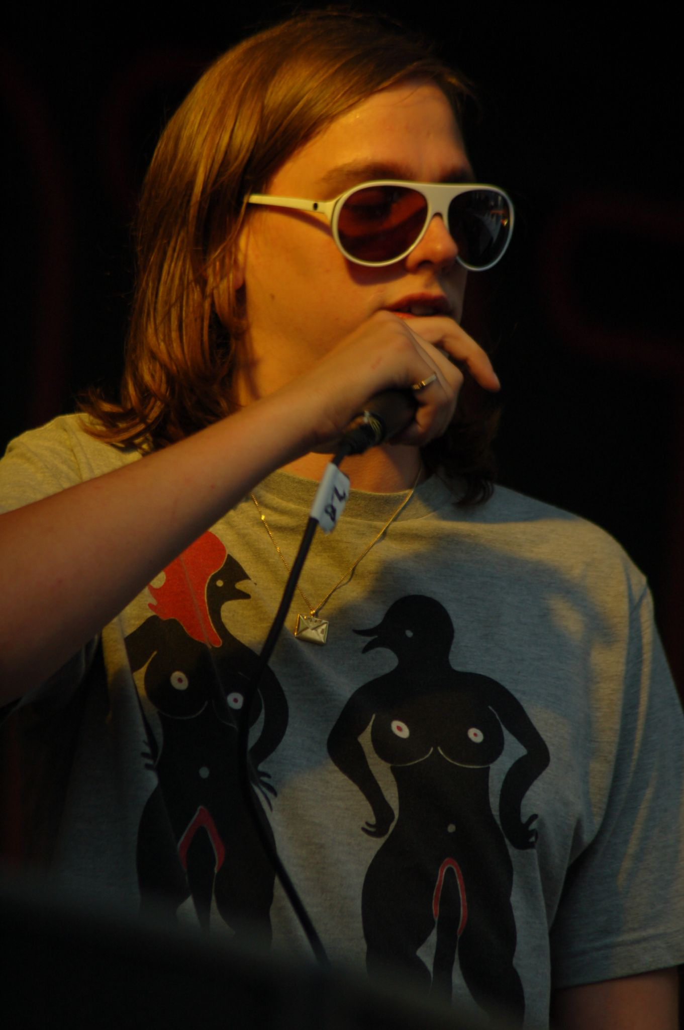 Pepijn Lanen (Utrecht, 1982), ook wel bekend als Peppie, Pepijn Von Bièreliér, P. Vermicelli, P. Dronq of P. Fabergé, is een rapper van de rapgroep De Jeugd van Tegenwoordig